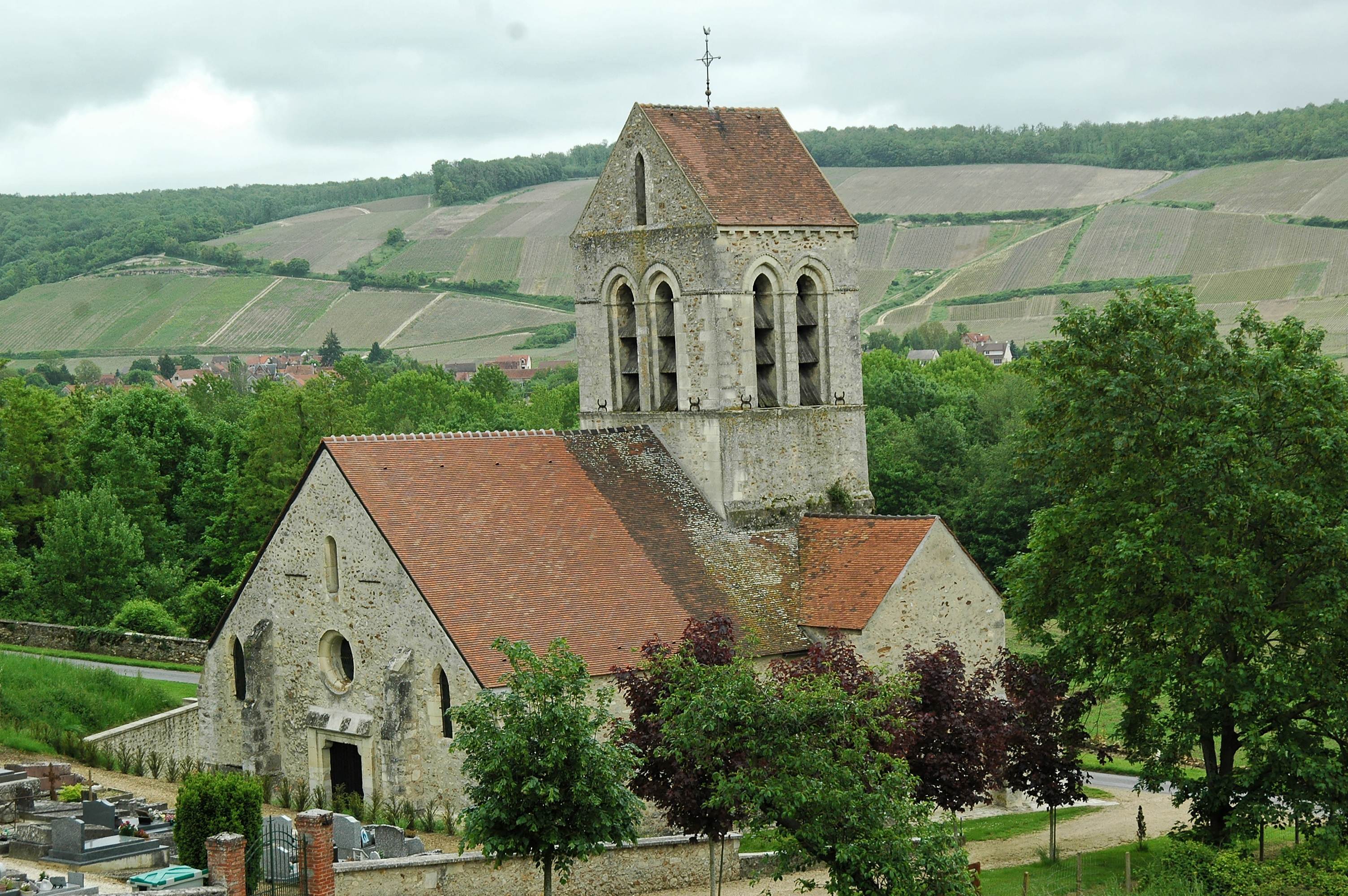 Église de Reuilly-Sauvigny.